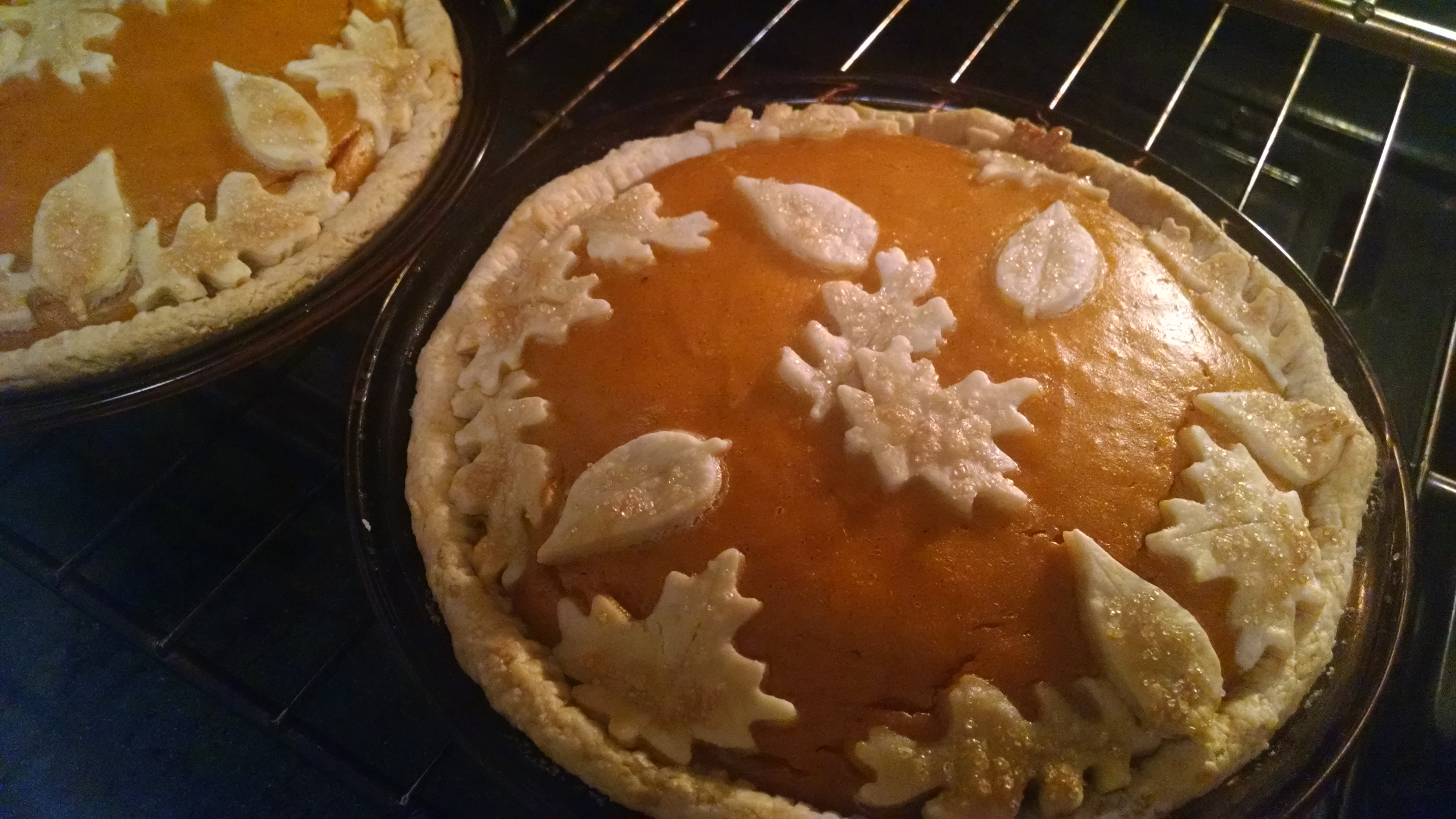 Sweet Potato Pie